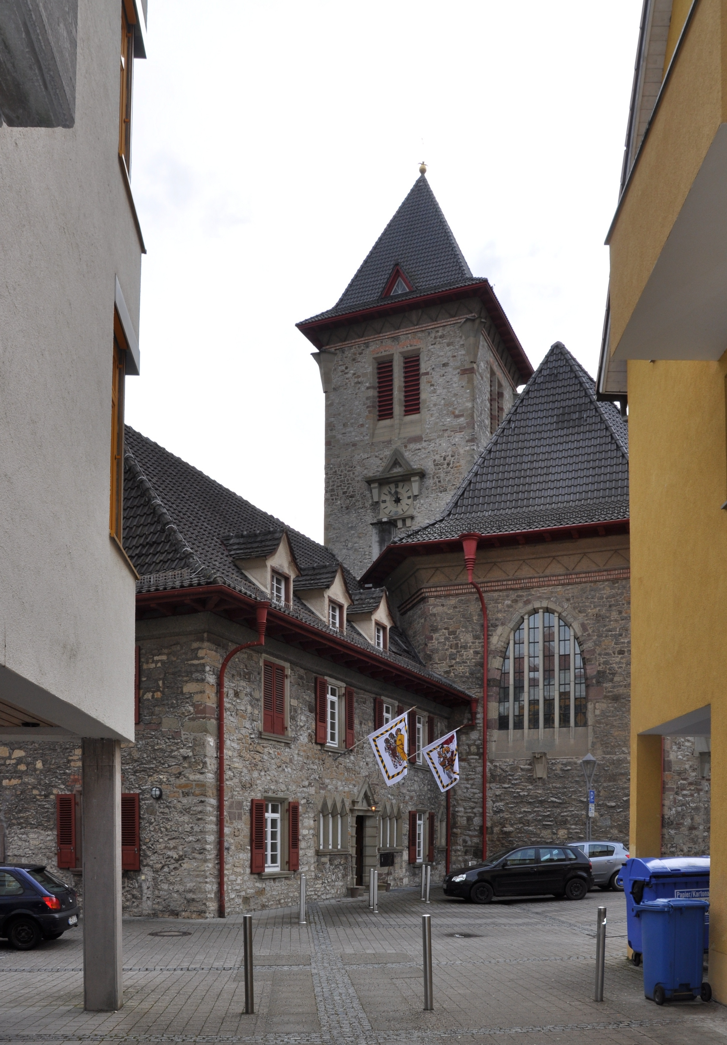 Oberndorf am Neckar, Pfarrhaus und katholische Pfarrkirche St. Michael